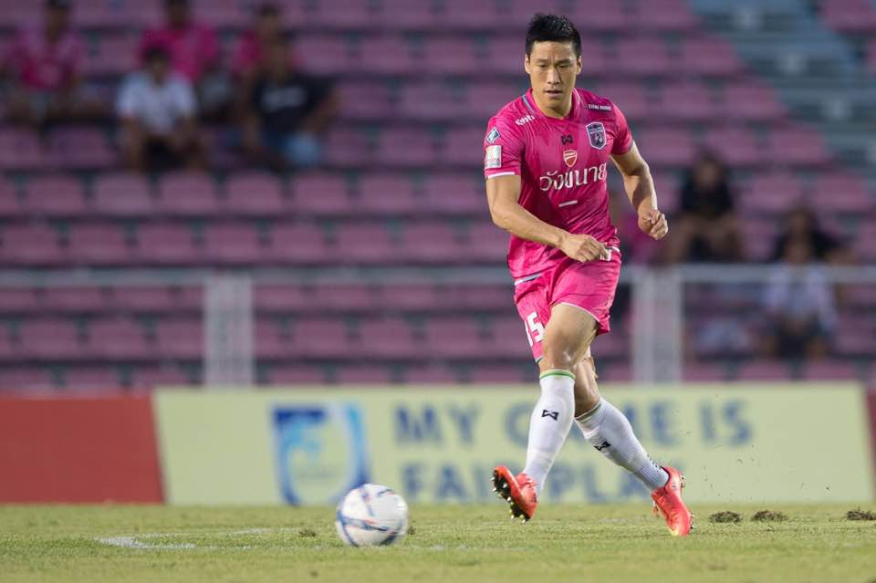 조태근35